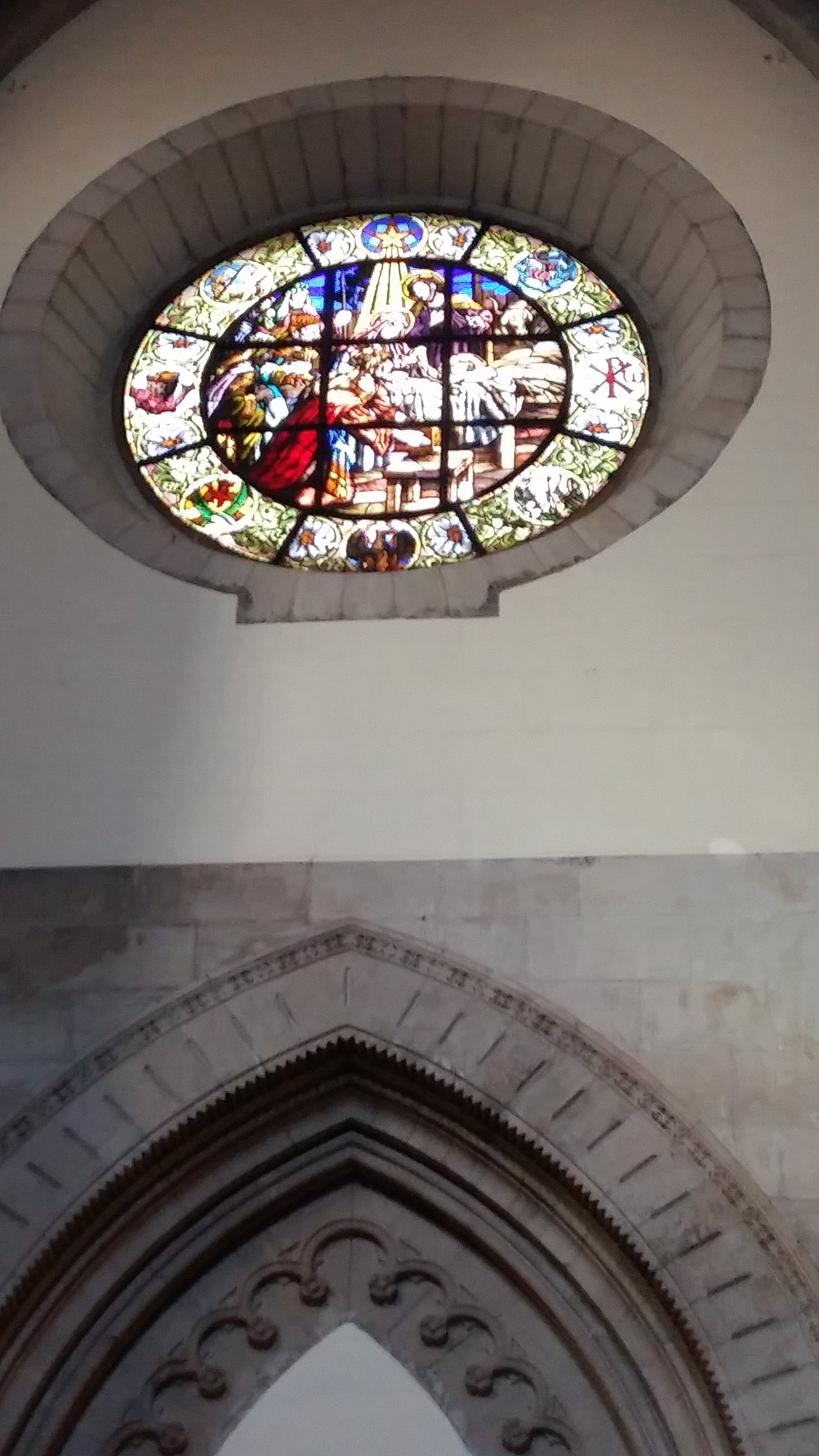 vitral escena bíblica Sant Joan